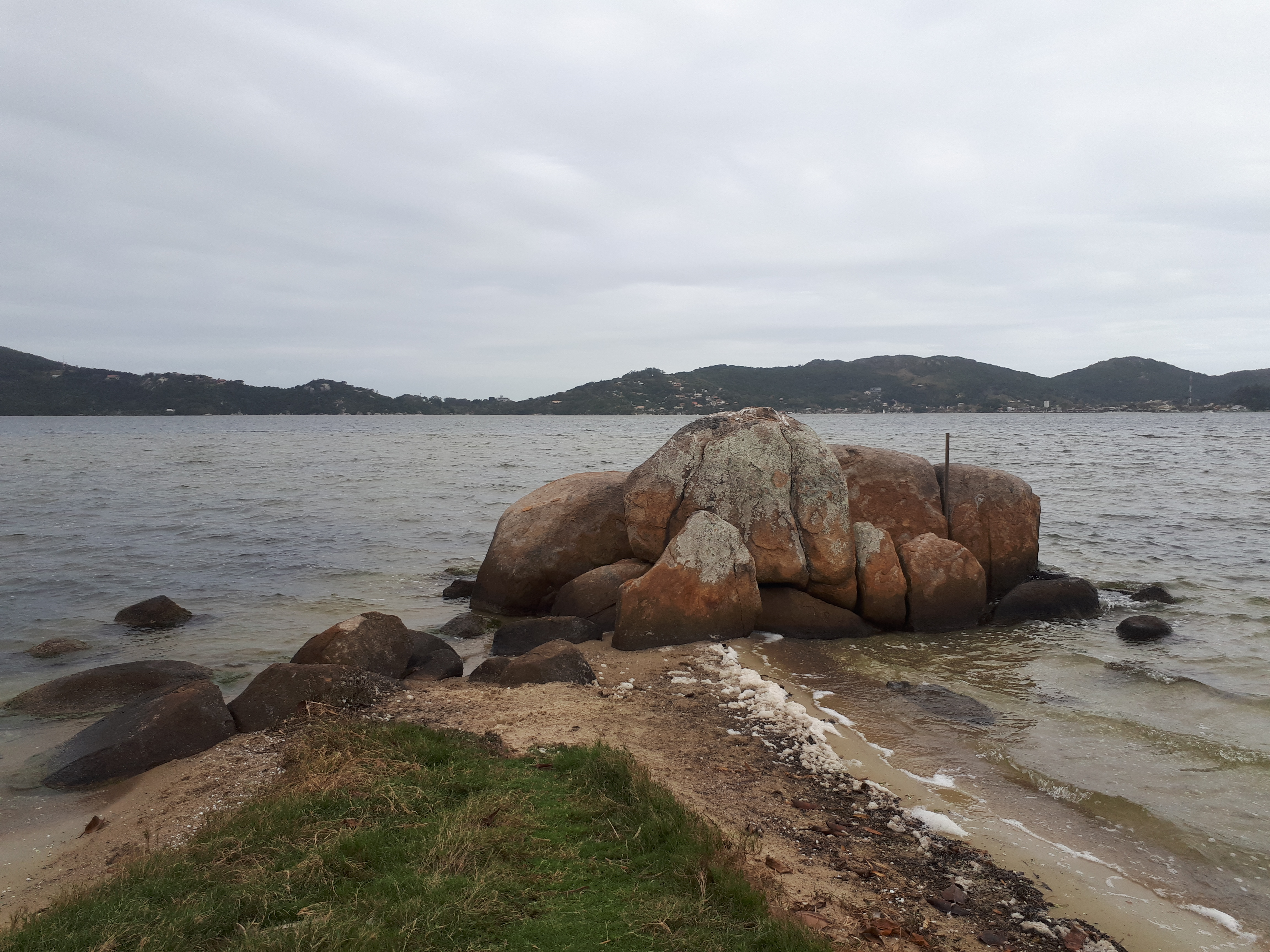 Sítio Arquelógico Ponta das Almas na Lagoa da Conceição Vista Leste